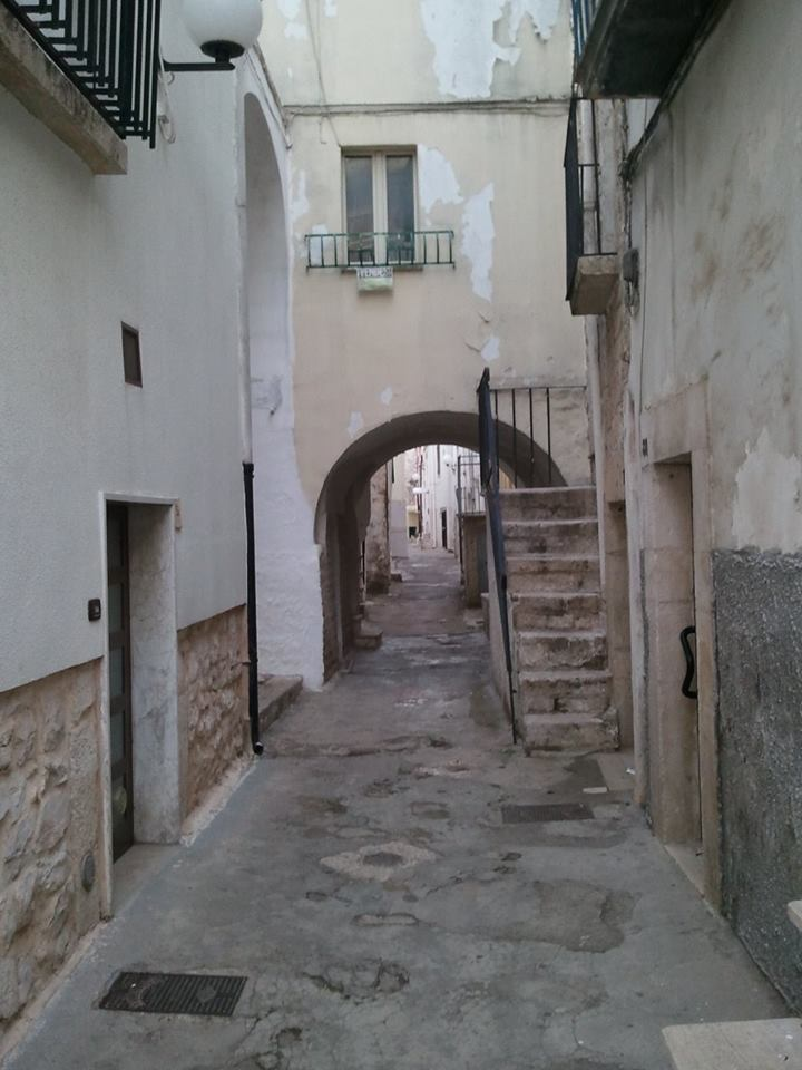 Piccolo arco nella Turi vecchia, detta anche Ture vècchie.